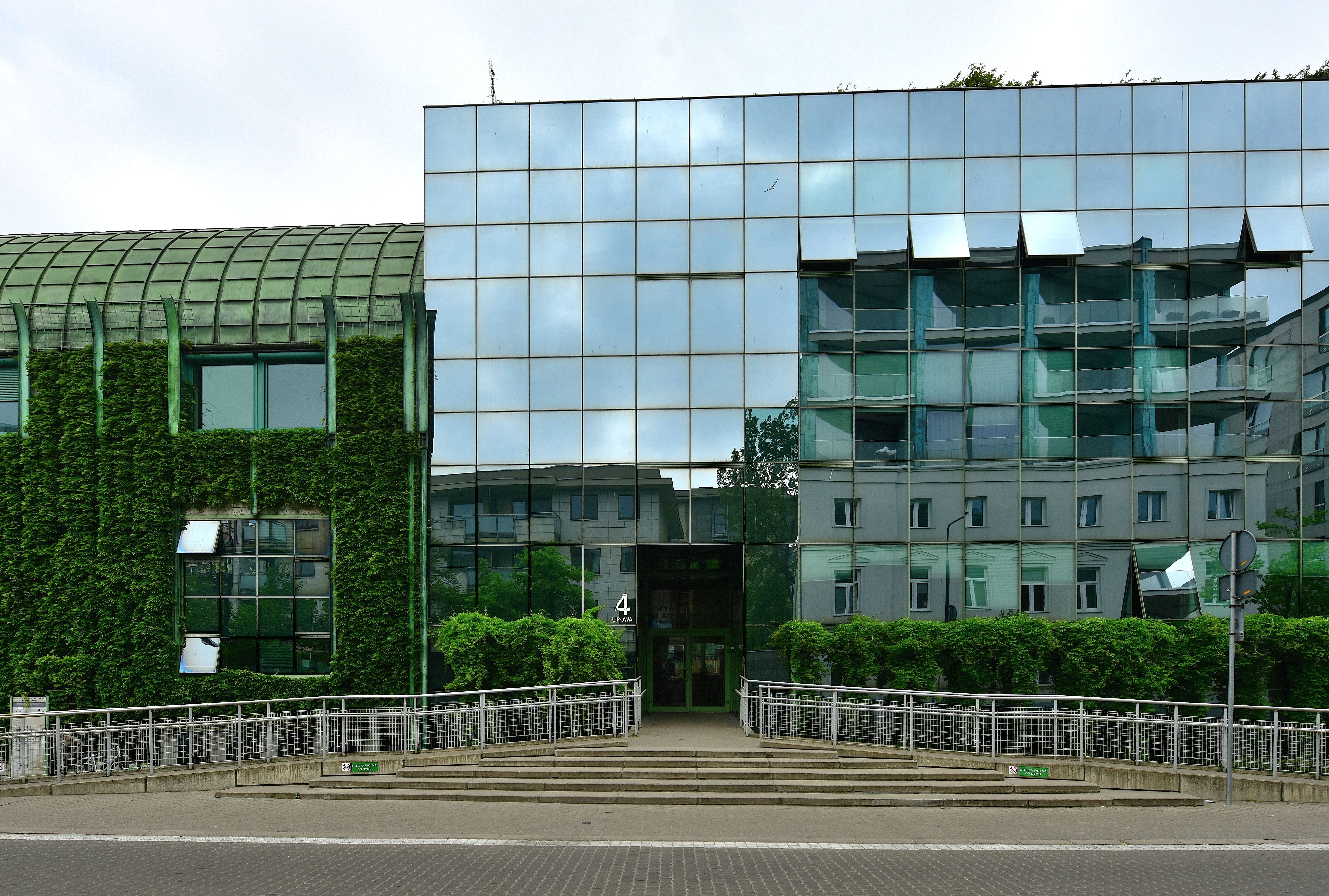 Budynek Wydziału Prawa UW przy ul. Lipowej 4 w Warszawie